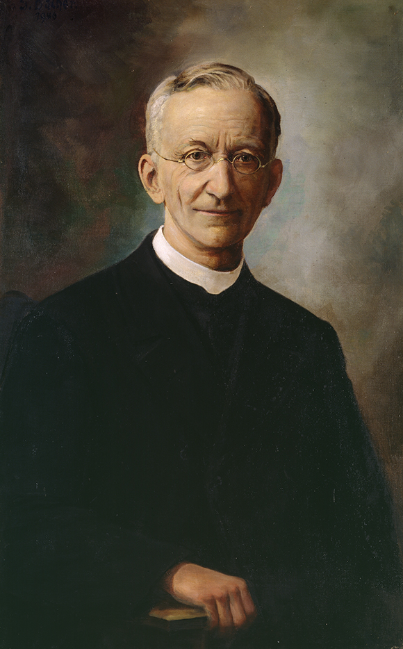 Le religieux français Léon Dehon, fondateur de la Société des prêtres du Sacré-cœur de Jésus, en 1920.